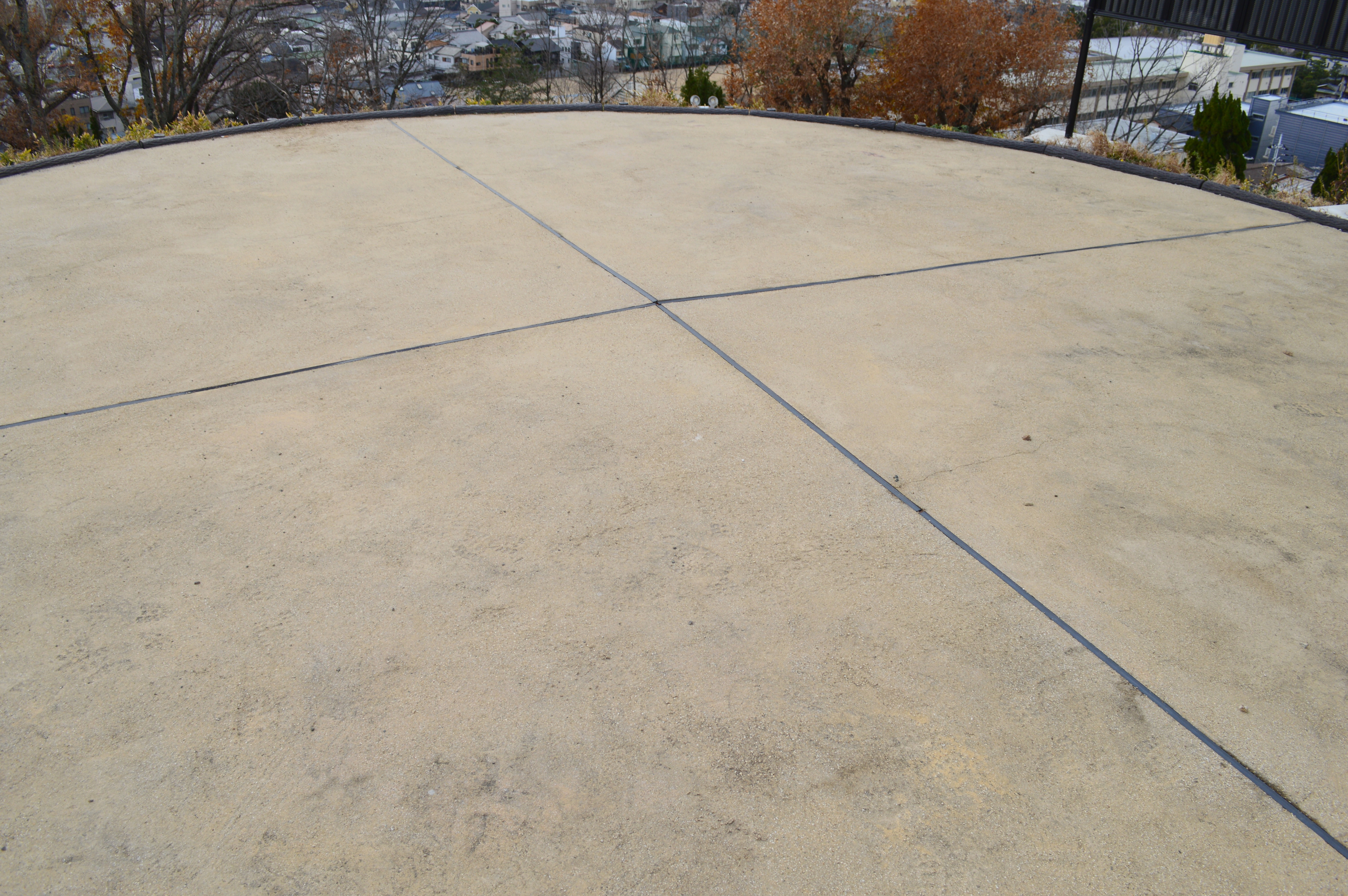 池田茶臼山古墳 後円部墳頂